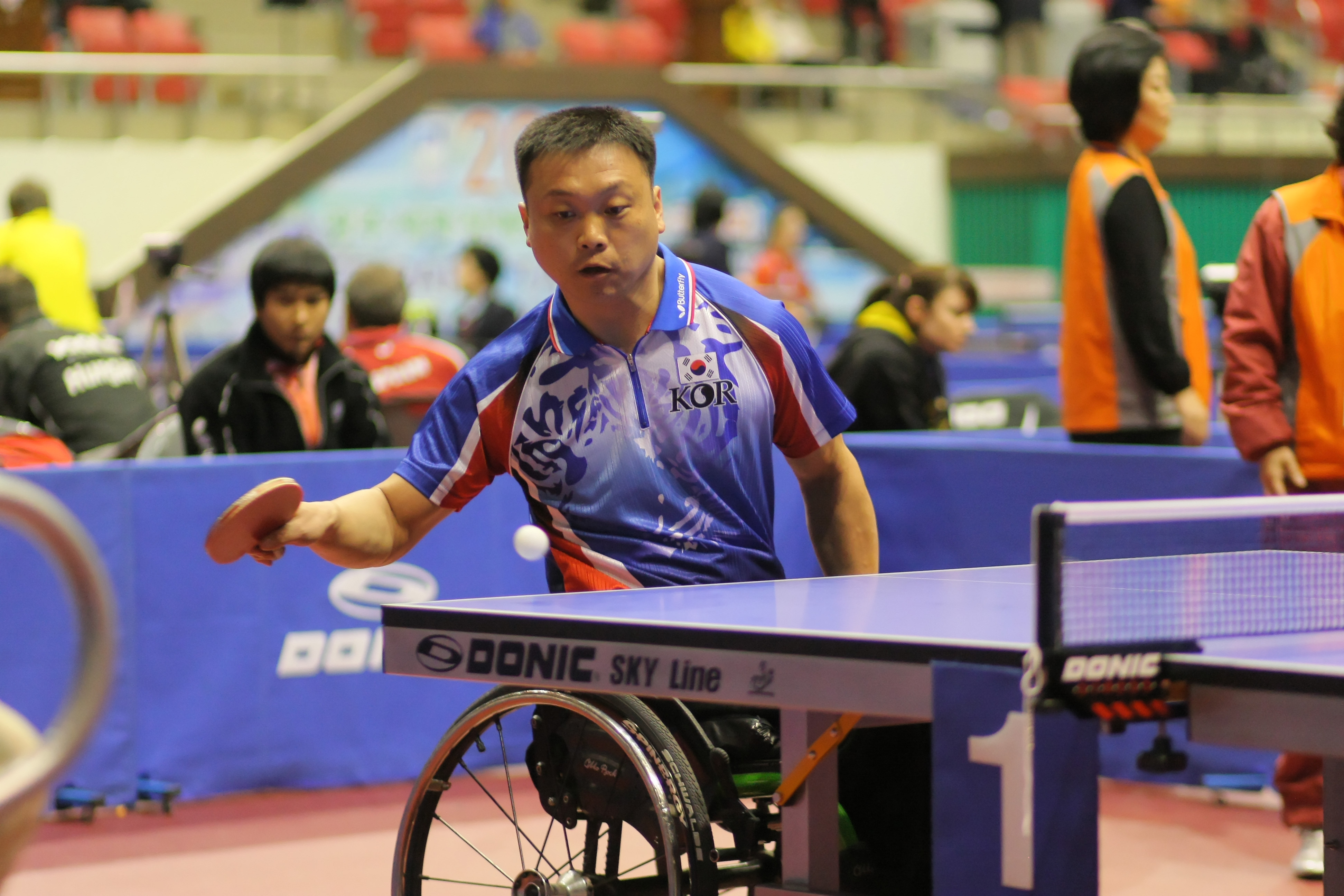 (KOR)